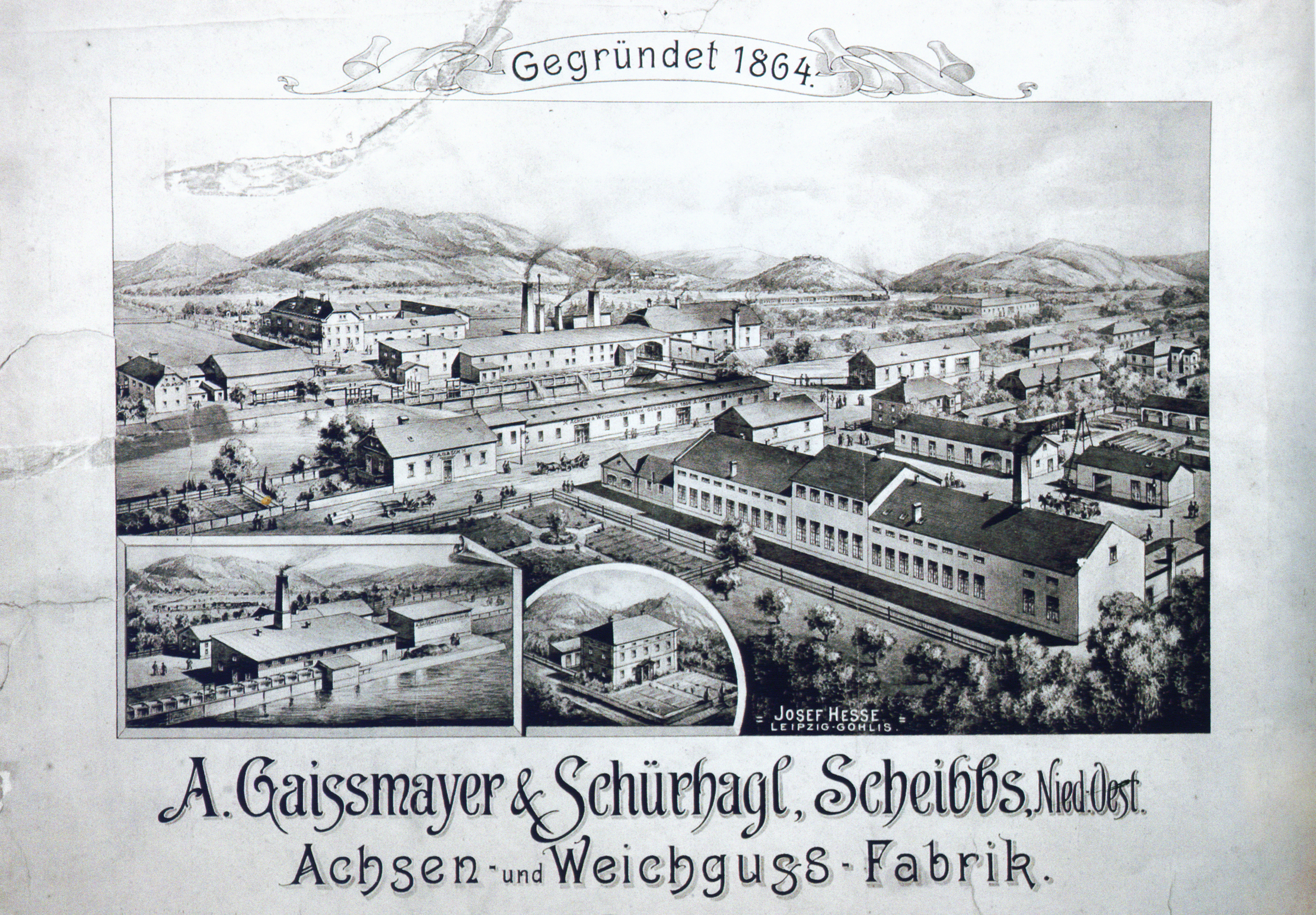 fabrik gaissmayr scheibbs